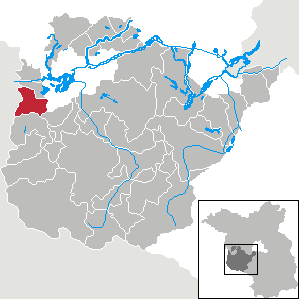 Rosenau in Brandenburg (Country) - District Potsdam-Mittelmark